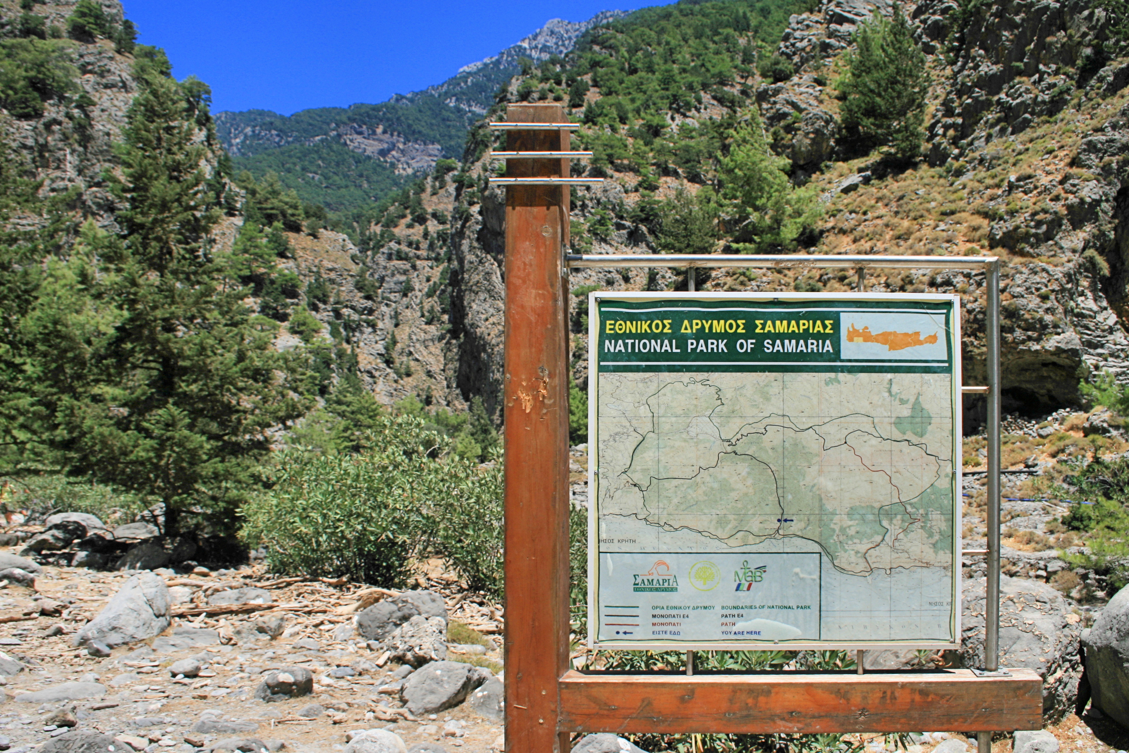 Nationalpark-Schild am südlichen Zugang zur Samaria-Schlucht auf der Insel Kreta